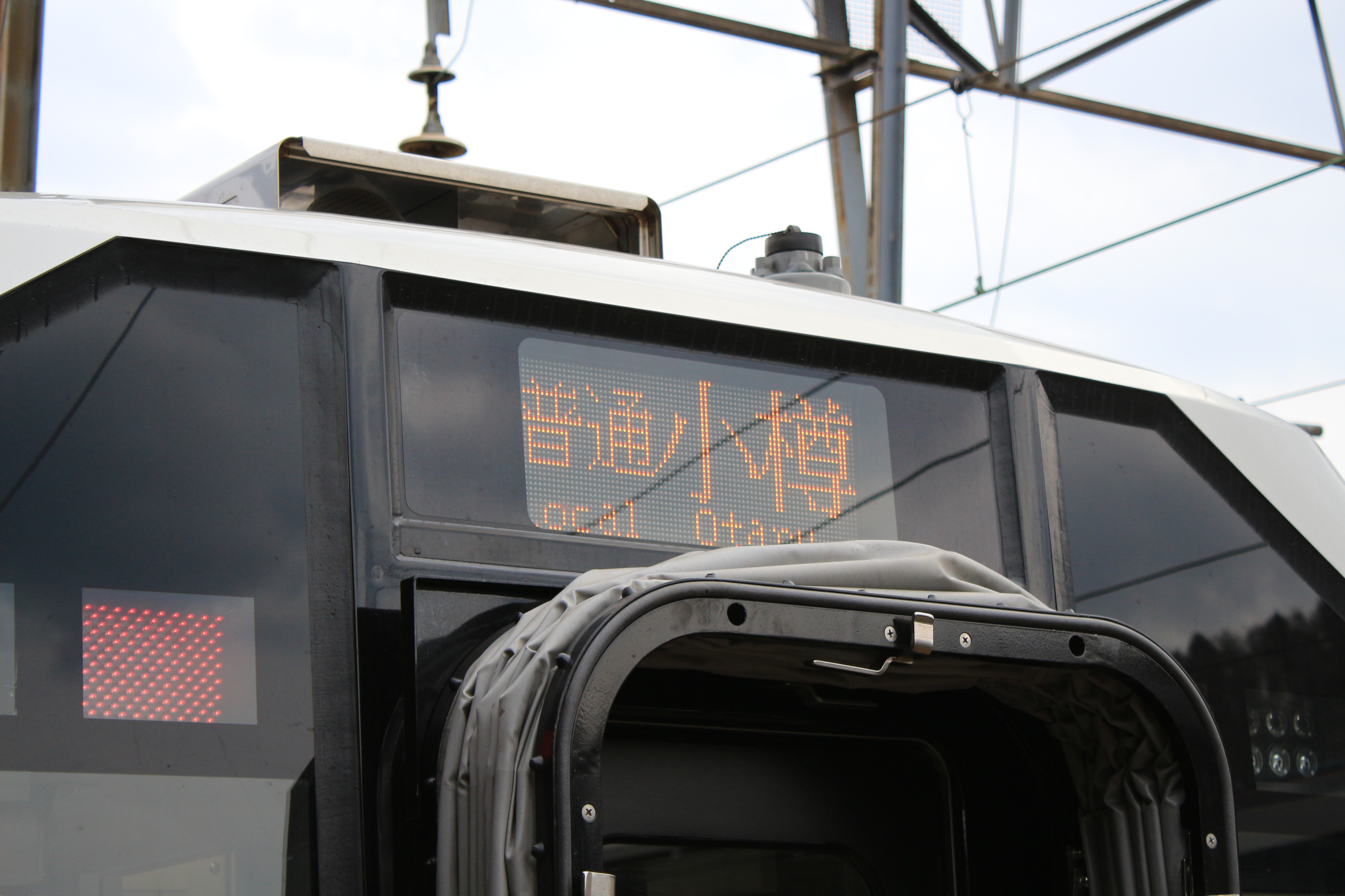 JR北海道 H100形 前面表示